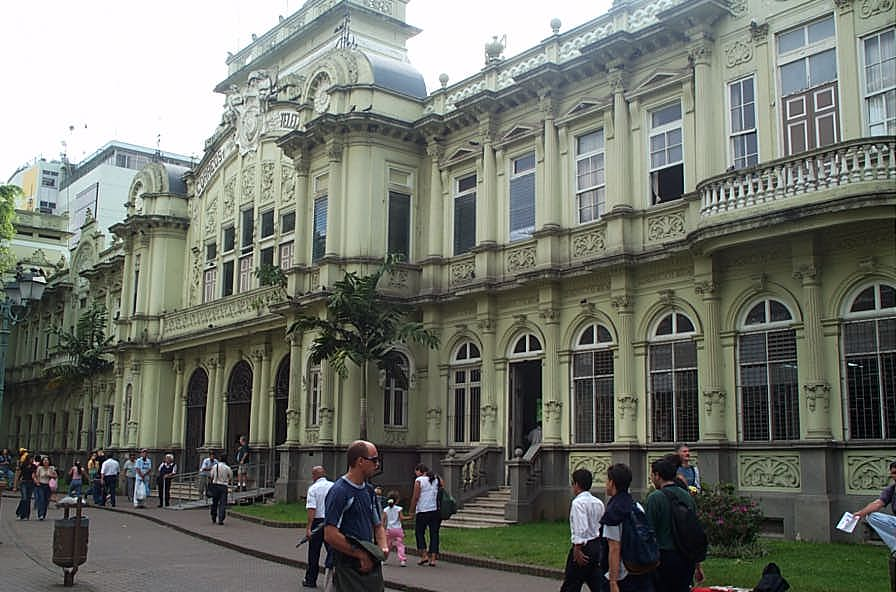 Edificio Correos, San Jose, Costa Rica